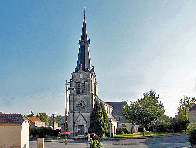 Blanzy la Salonnaise, église vue du parvis